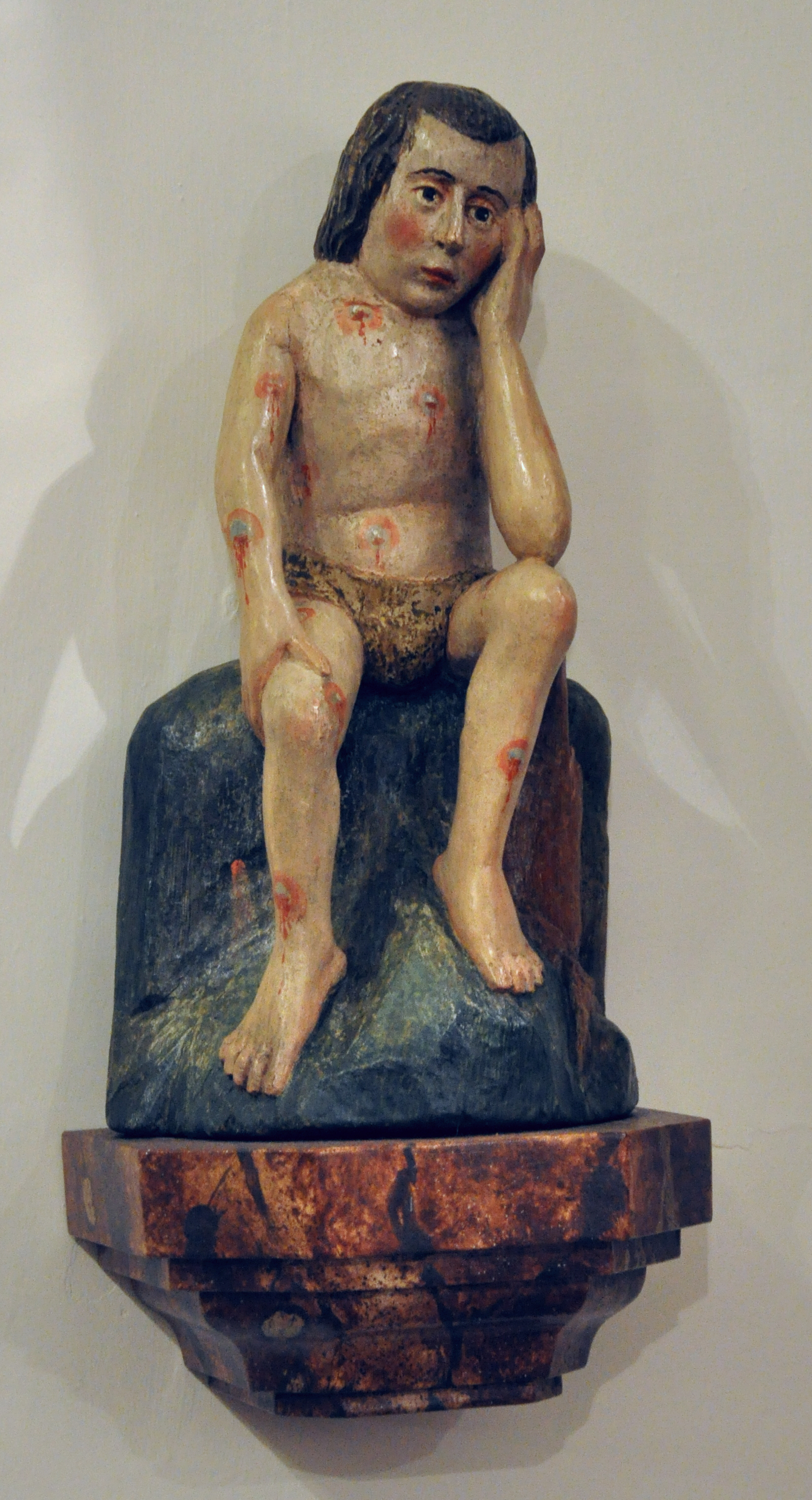 Levertsweiler (Gemeinde Ostrach), Katholische Pfarrkirche St. Luzia Skulptur "Hiob"